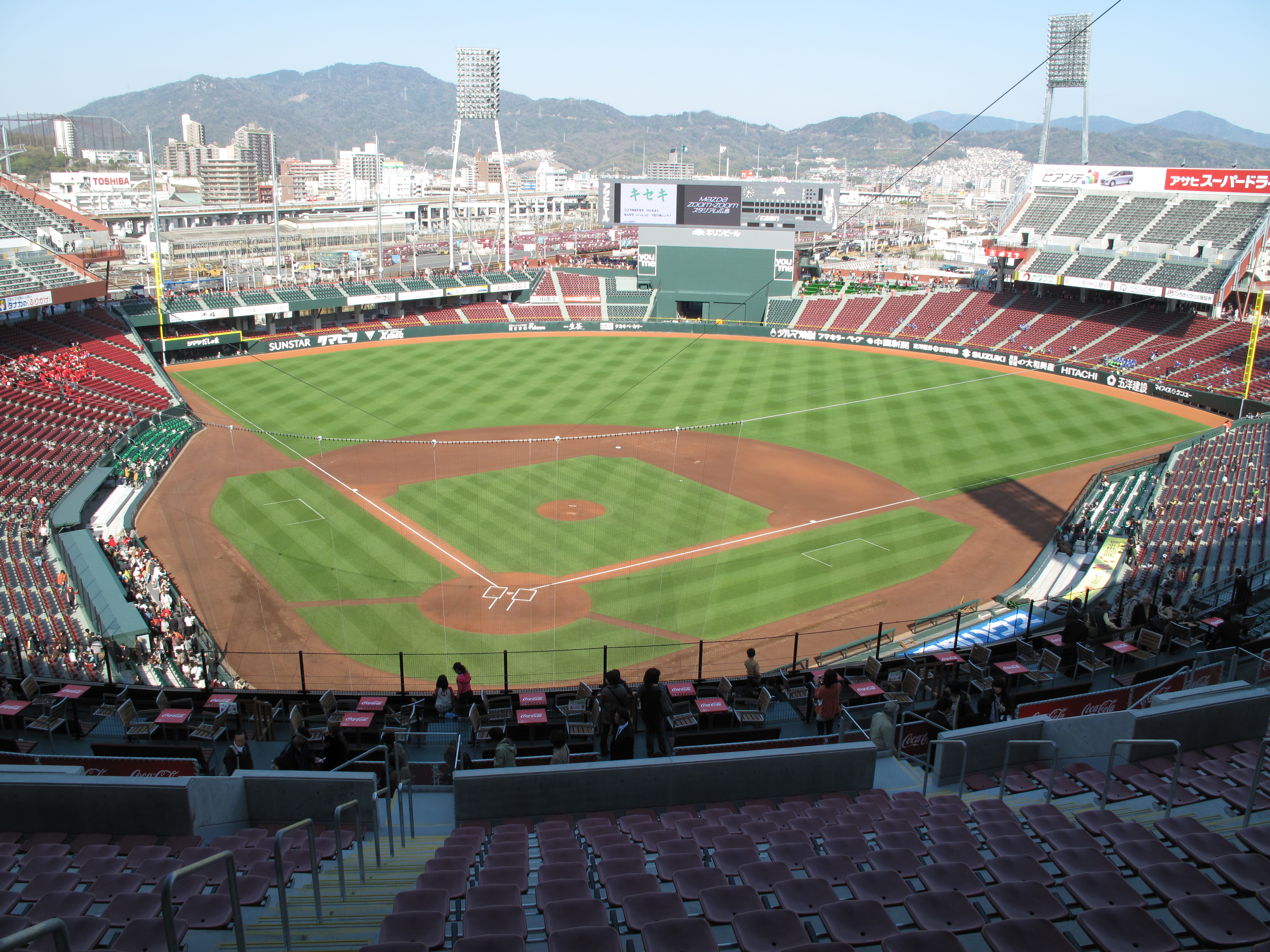 2009年4月2日、広島市民球場（マツダスタジアム）２階スタンドより本人撮影 2009年4月2日 (木) 21:46 . . HKT3012 . . 4,416×3,312 (6.73 メガバイト)